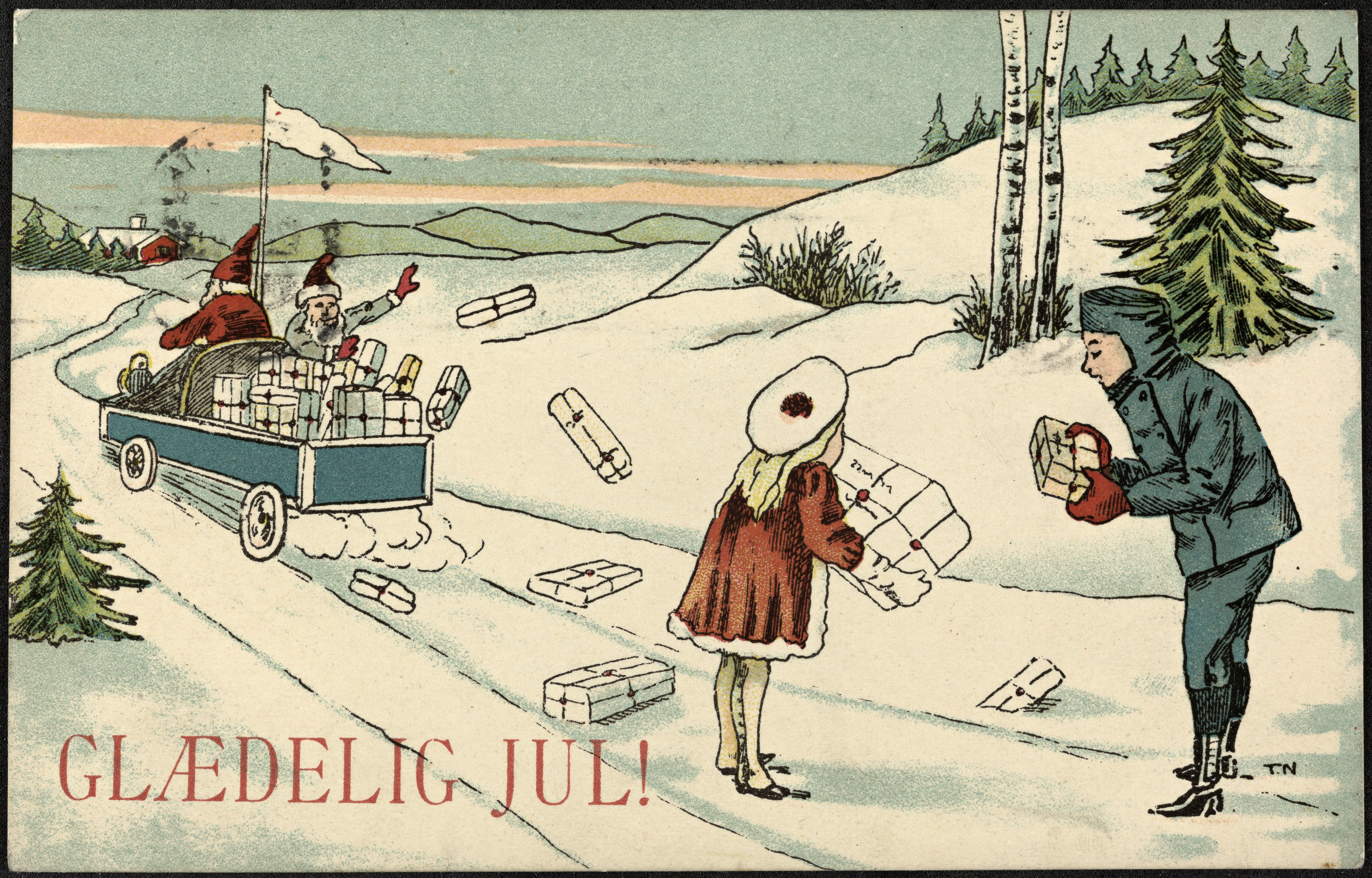 Dato / Date: ca. 1909 Kunstner / Artist: T. N. Utgiver / Publisher: ukjent / unknown Digital kopi av original / Digital copy of original: trykt postkort, farge Eier / Owner Institution: Nasjonalbiblioteket / National Library of Norway Lenke / Link: Bildesignatur / Image Number: blds_07555